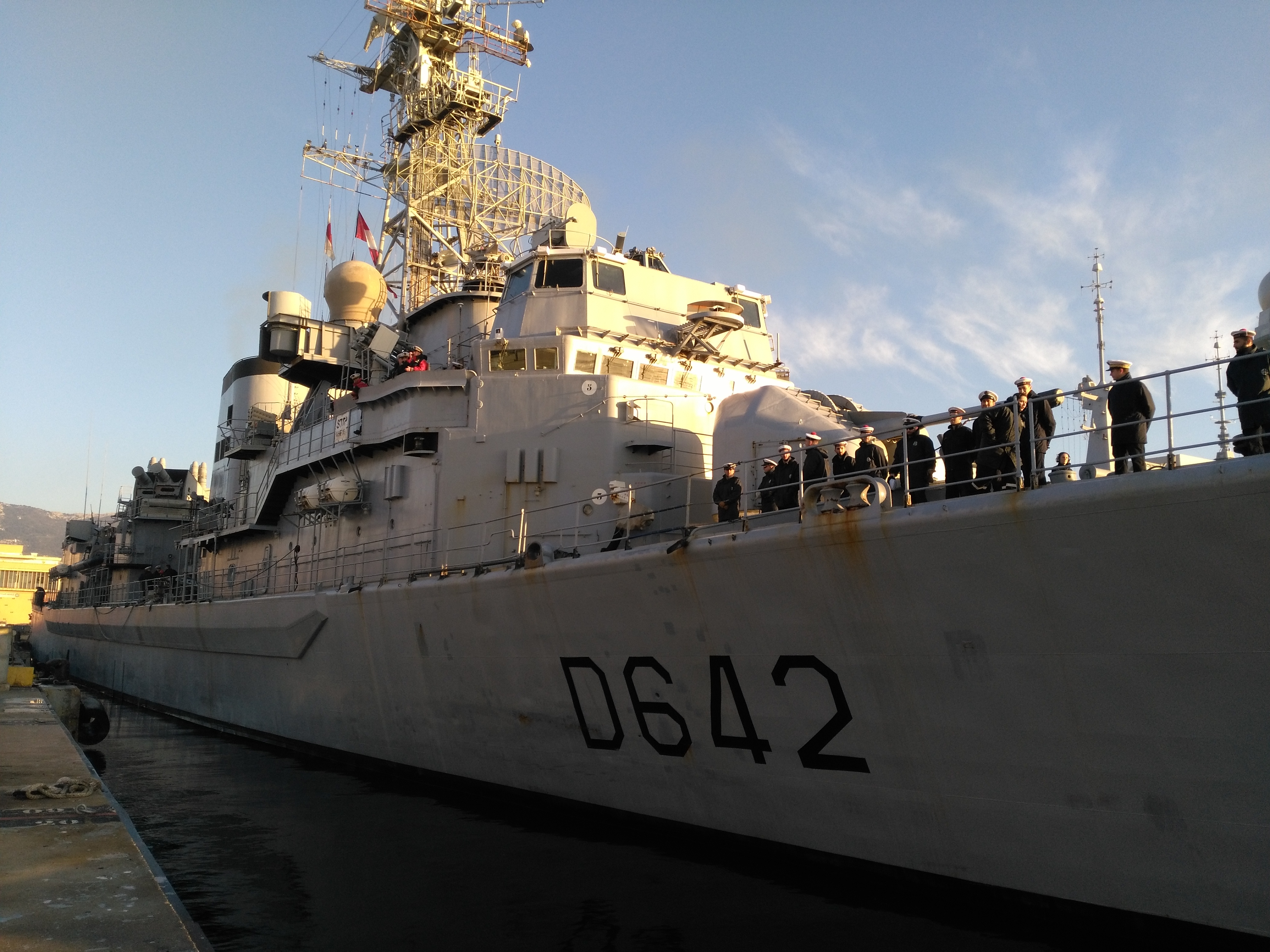 Le Montcalm à l'appareillage pour sa dernière mission, le 4 janvier 2017. Notez le bulge de renfort de coque et la passerelle modifiée dans le cadre du programme OP 3A.